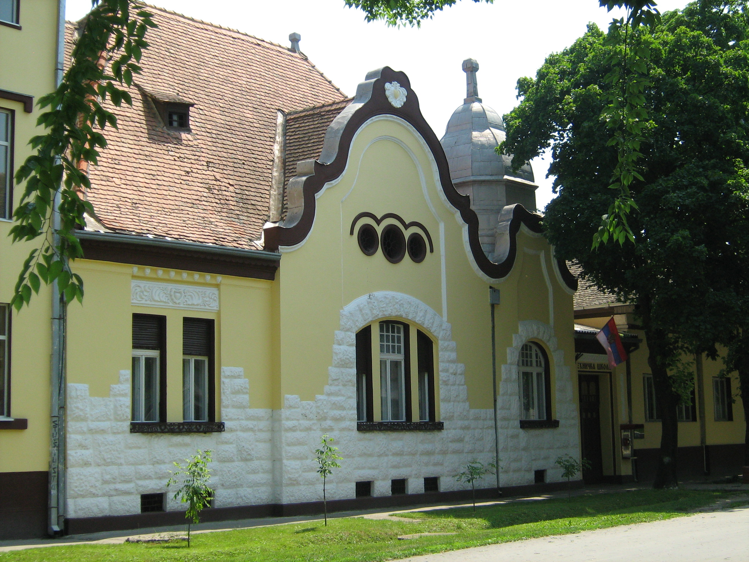 Tehnička Škola Odžaci